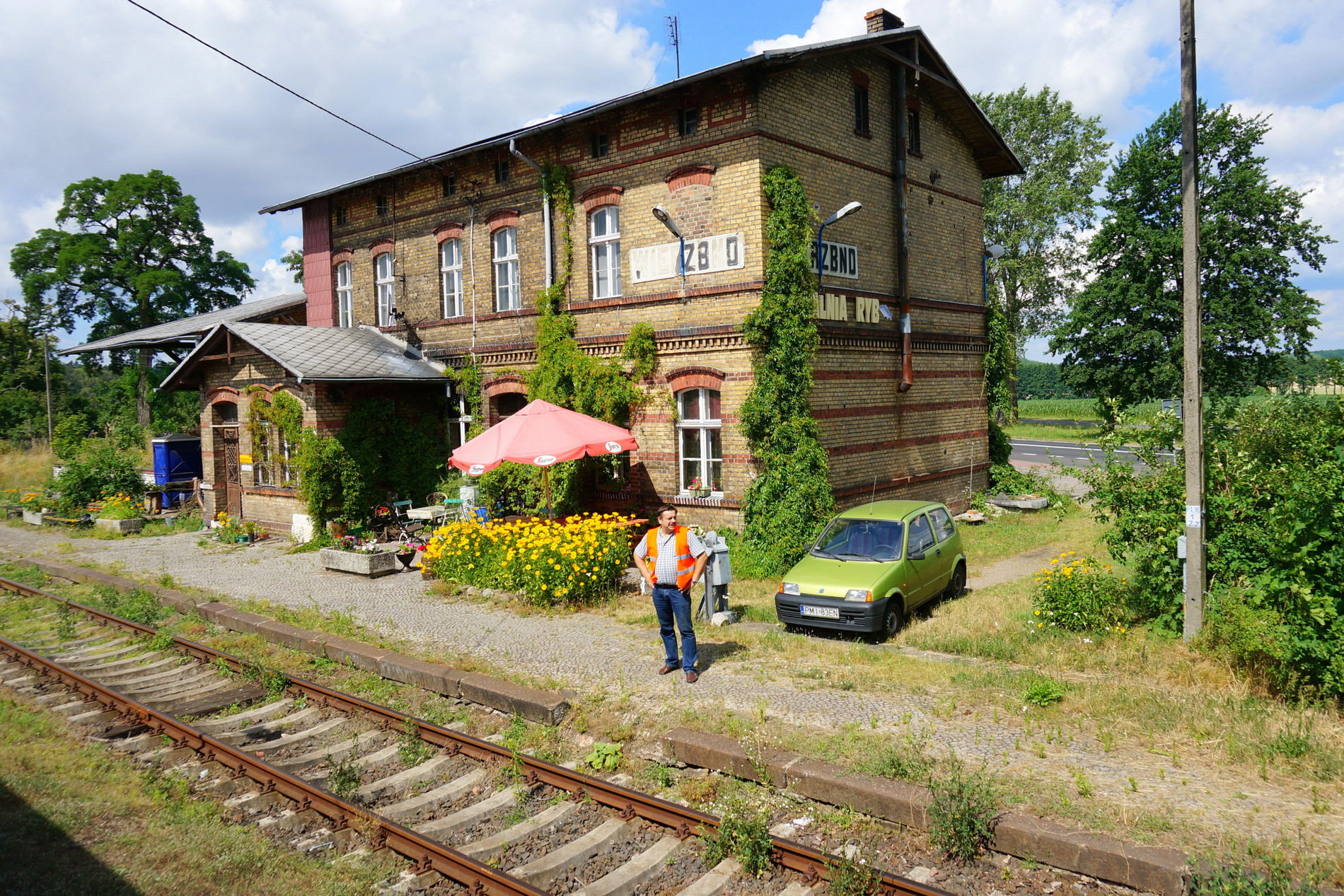 Stacja kolejowa Wierzbno, linia kolejowa nr 363.